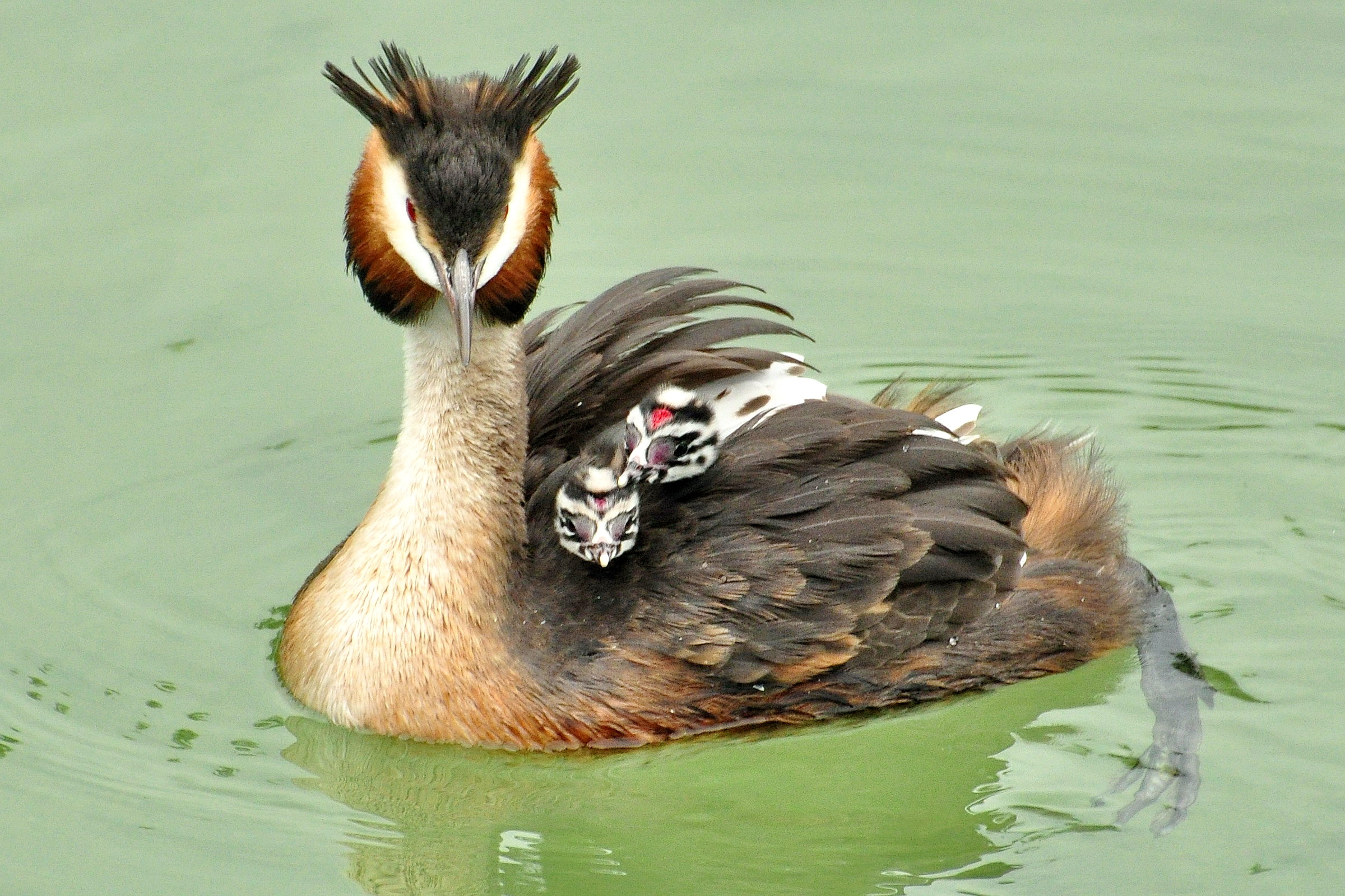 Podiceps cristatus on Obersee (upper Lake Zürich) respectively Seedamm and the wooden bridge (Holzbrücke) between Hurden and Rapperswil in Switzerland